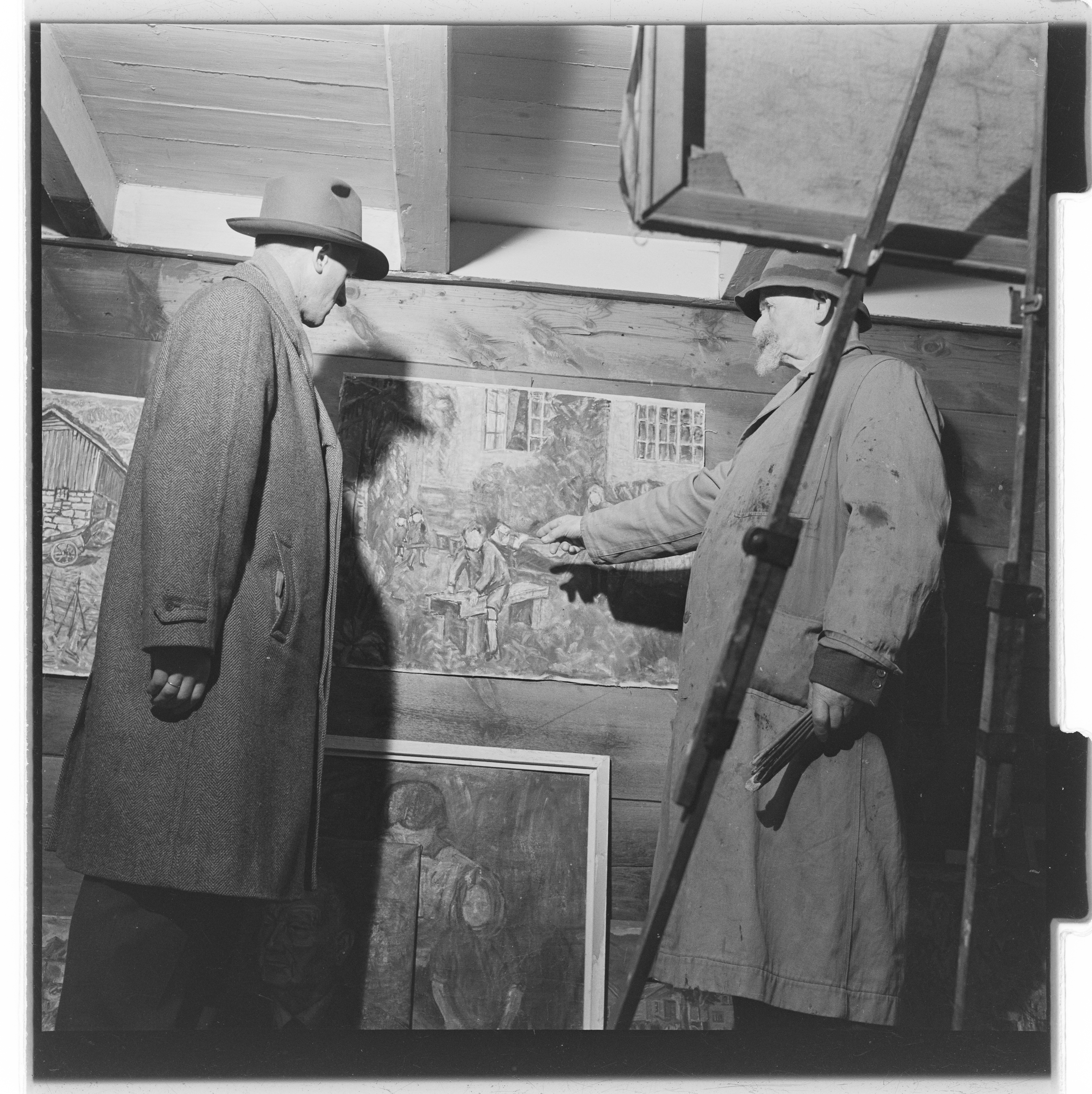 Bildet er hentet fra Arkivverket. Foto tatt i forbindelse med reportasje om malerne Karl og Oddvar Straume fra Ørstavik, Sunnmøre. NÅ nr. 3 Arkivinstitusjon : Riksarkivet Arkivnavn : Billedbladet NÅ Sted : Norge, Møre og Romsdal, Ukjent, Sunnmøre Emneord: Kunstnere, Malere, Maleri, Kunst Avbildet